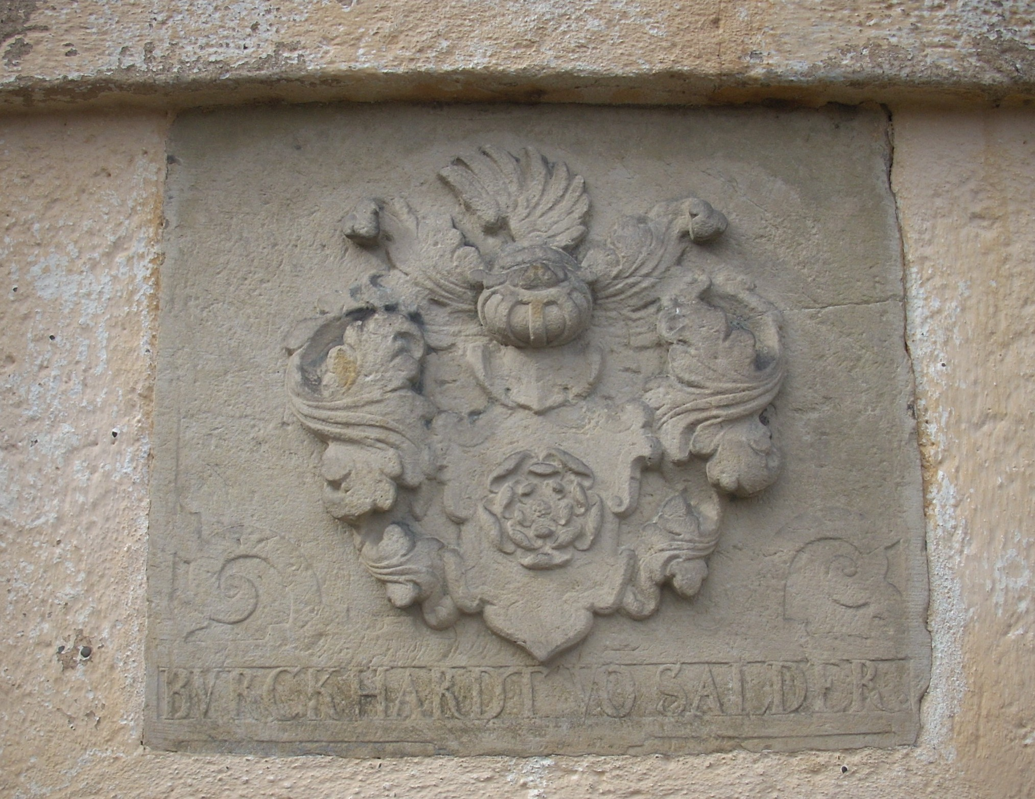 Equord (Hohenhameln), Ev. Markuskirche, Wappen